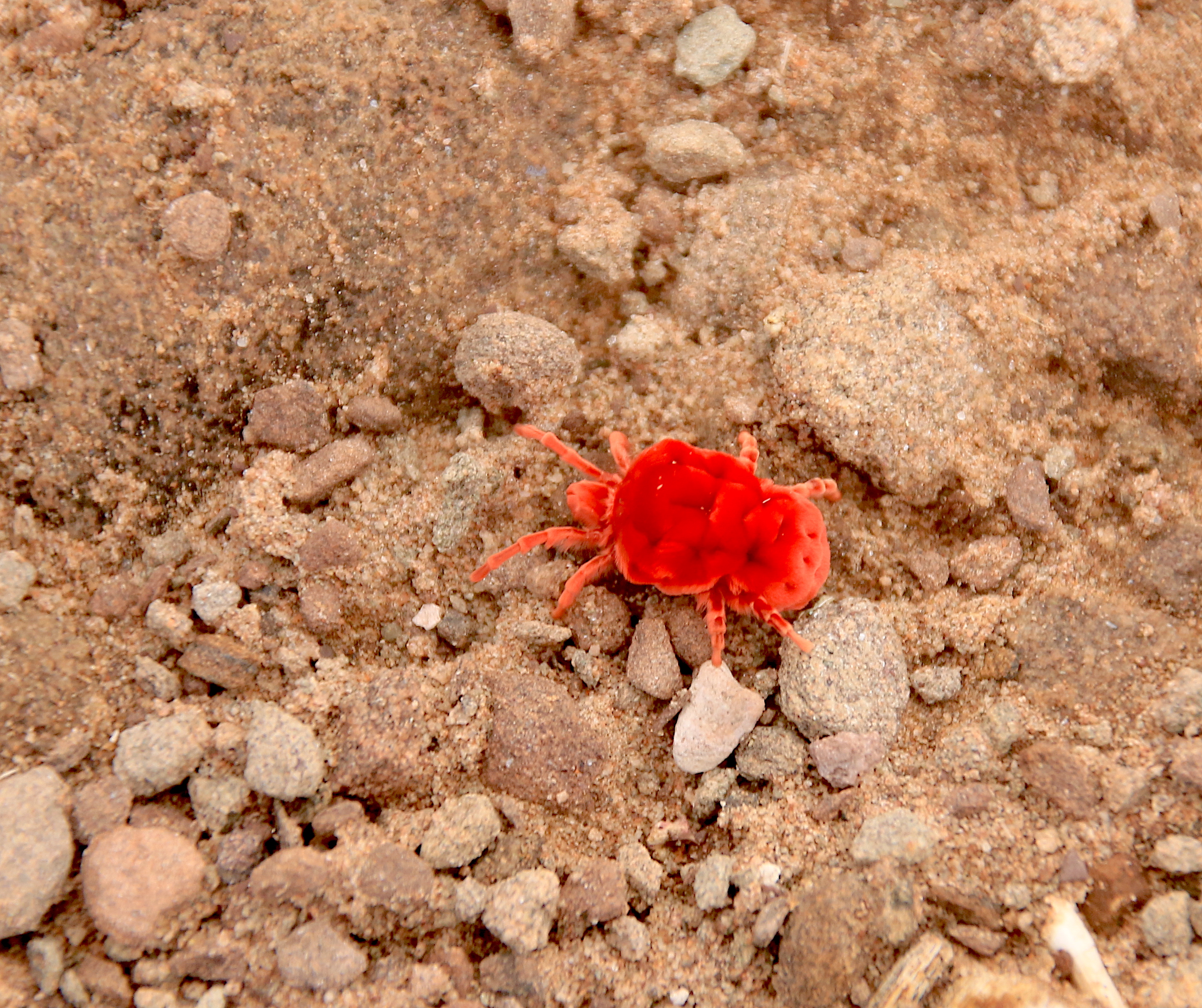 Rote Samtmilbe (Namibia)